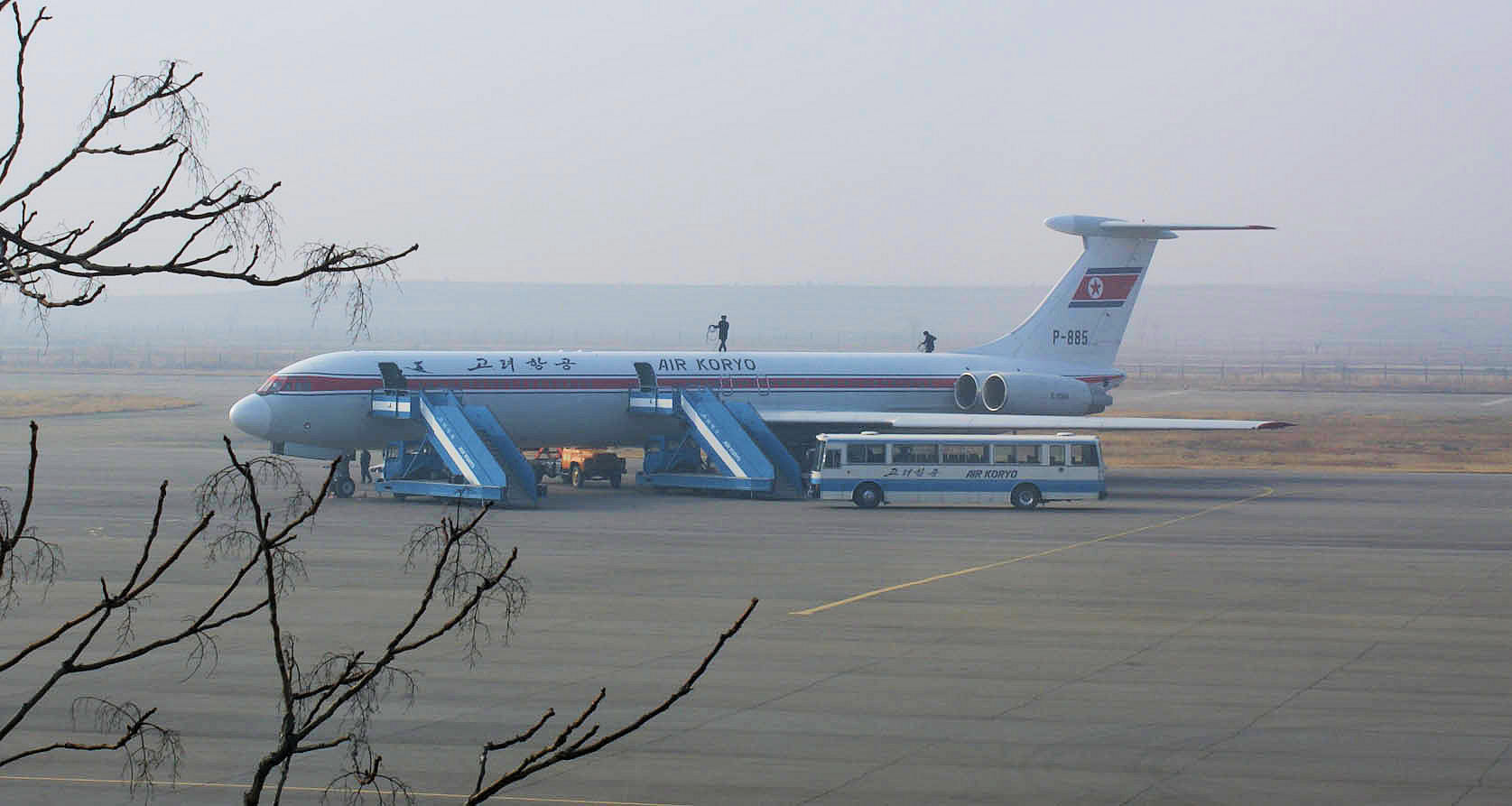 Air koryo IlyushinIl-62M